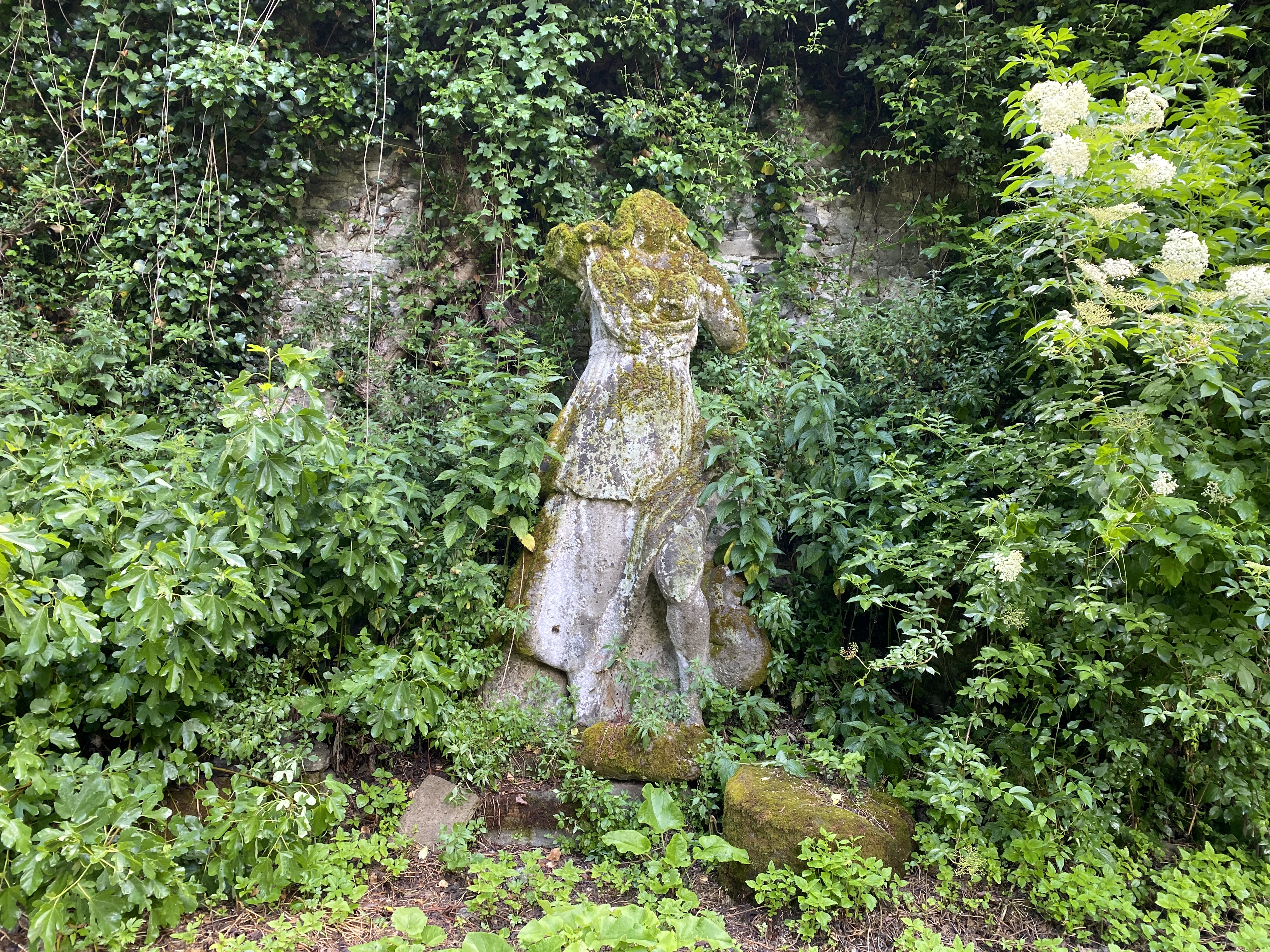 Barco Colonna a Marino